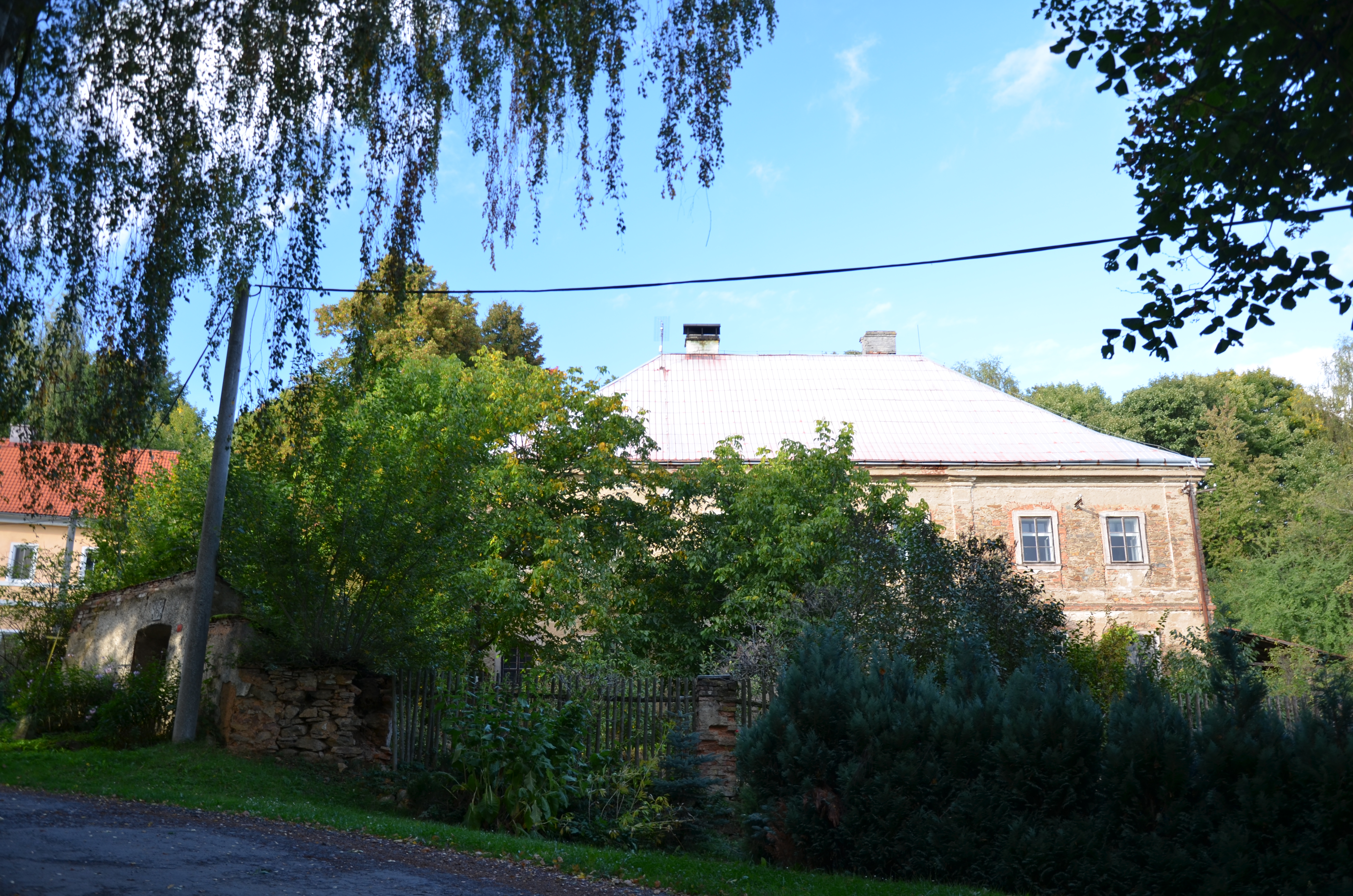 Fara va Pístově - 2012/IX.